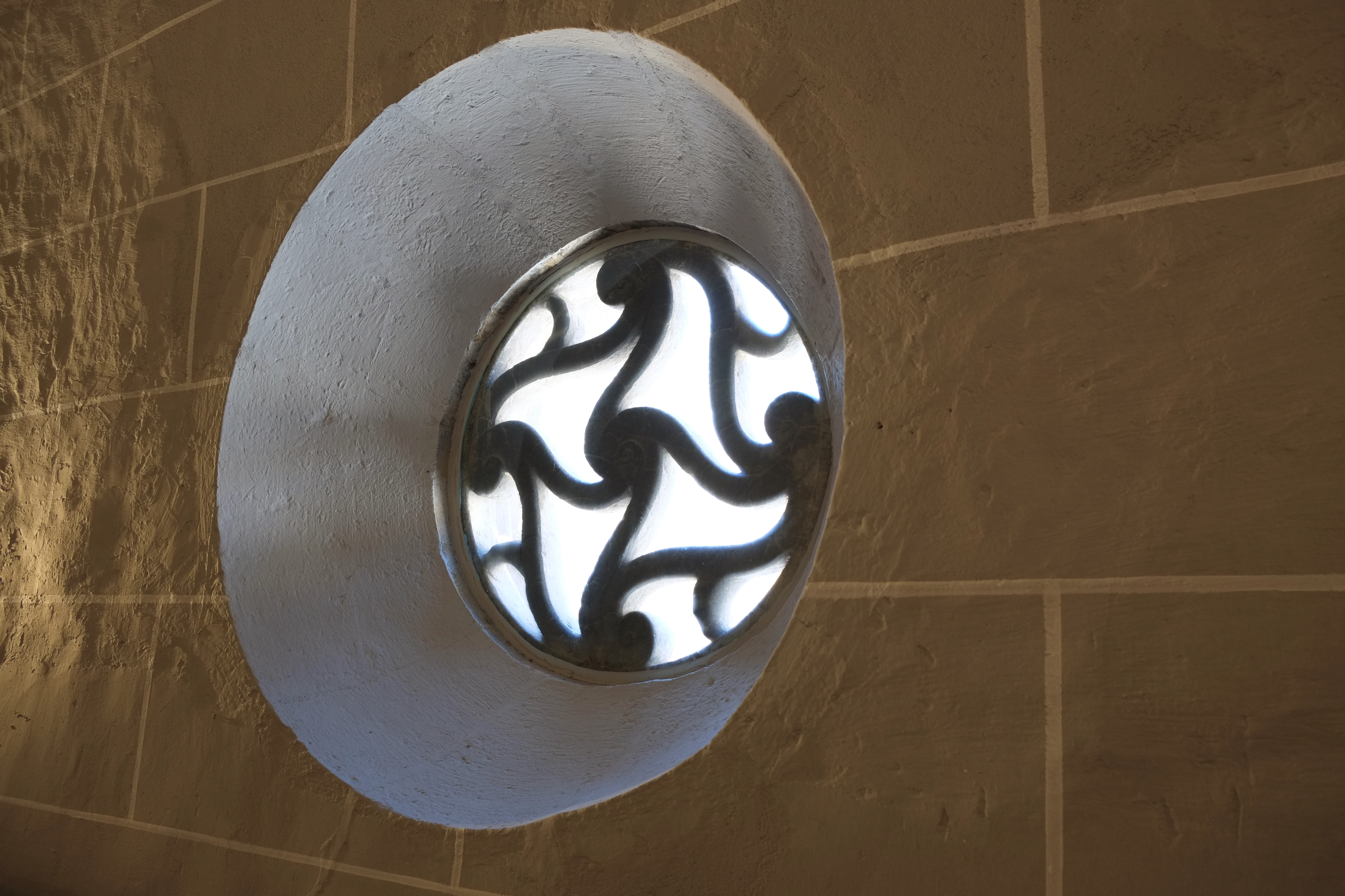 Kirche Nuestra Señora de La Asunción in La Puebla de Fantova in Aragonien (Spanien)